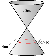 Le cercle est l'intersection d'un cône de révolution avec un plan perpendiculaire à l'axe de révolution du cône. Auteur : Christophe Dang Ngoc Chan, réalisé avec un programme de dessin vectoriel Licence GFDL Christophe Dang Ngoc Chan